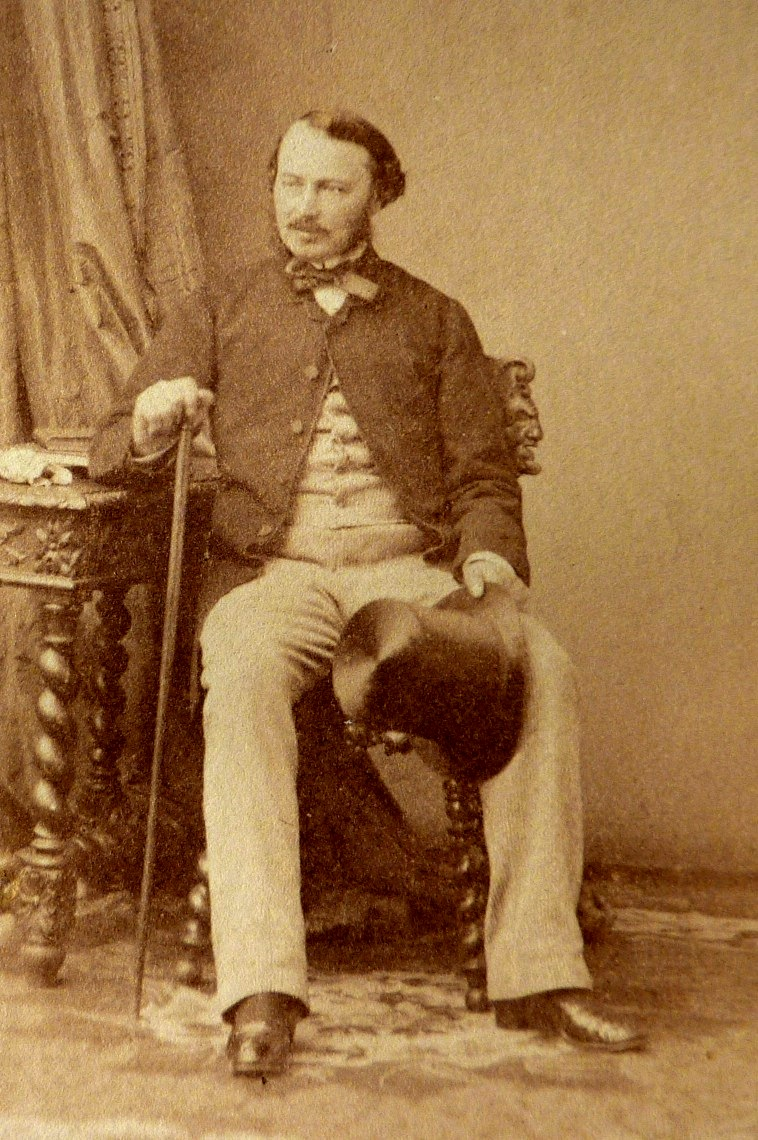 Photographie par Disderi & Cie